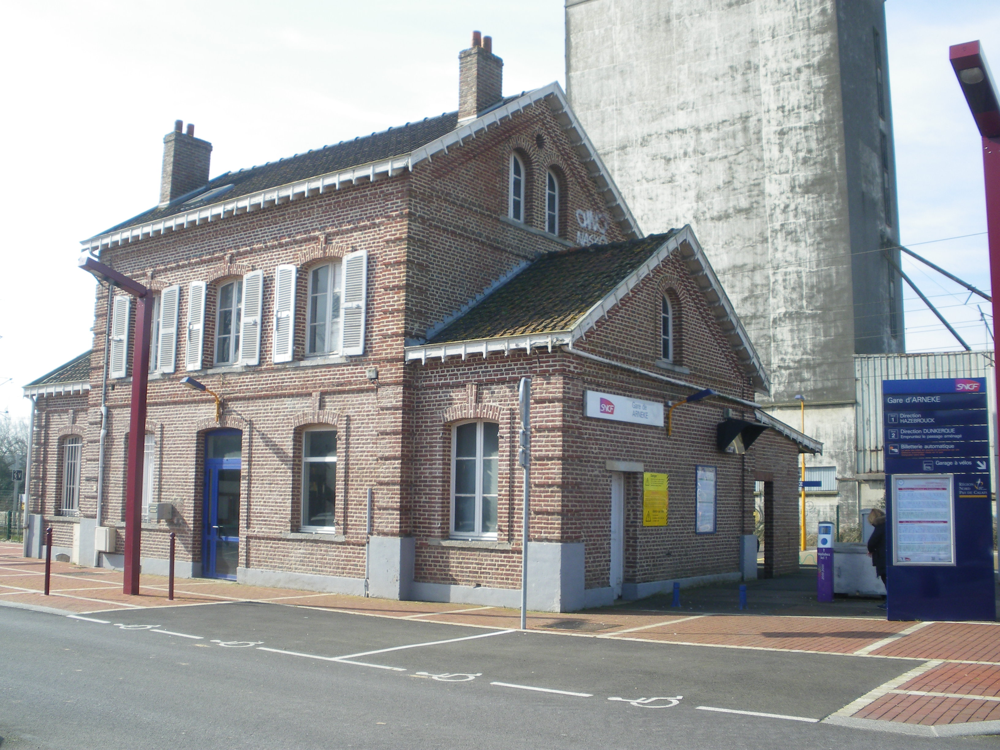 Vue du bâtiments voyageurs de la gare d'Arnèke.